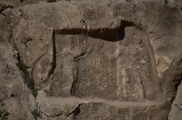 Relevo de Dilaque com Vararanes e Saburductaces